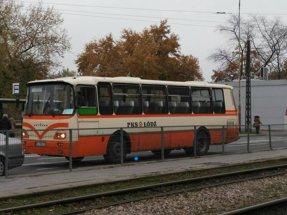 autosan H9 21 rok produkcji 1994 linia ; 20